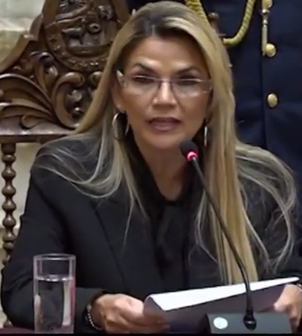 Jeanine Añez Chávez en diciembre de 2019